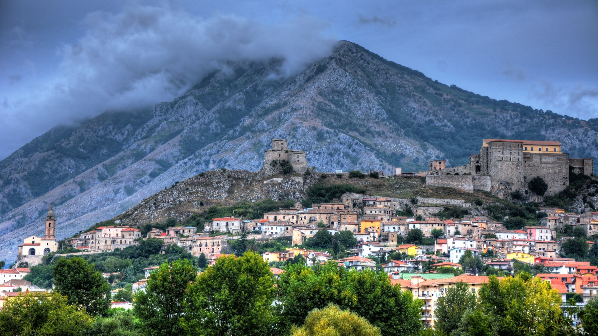 Centro storico di Montesarchio con veduta della Torre e del Castello sullo sfondo del Monte Taburno